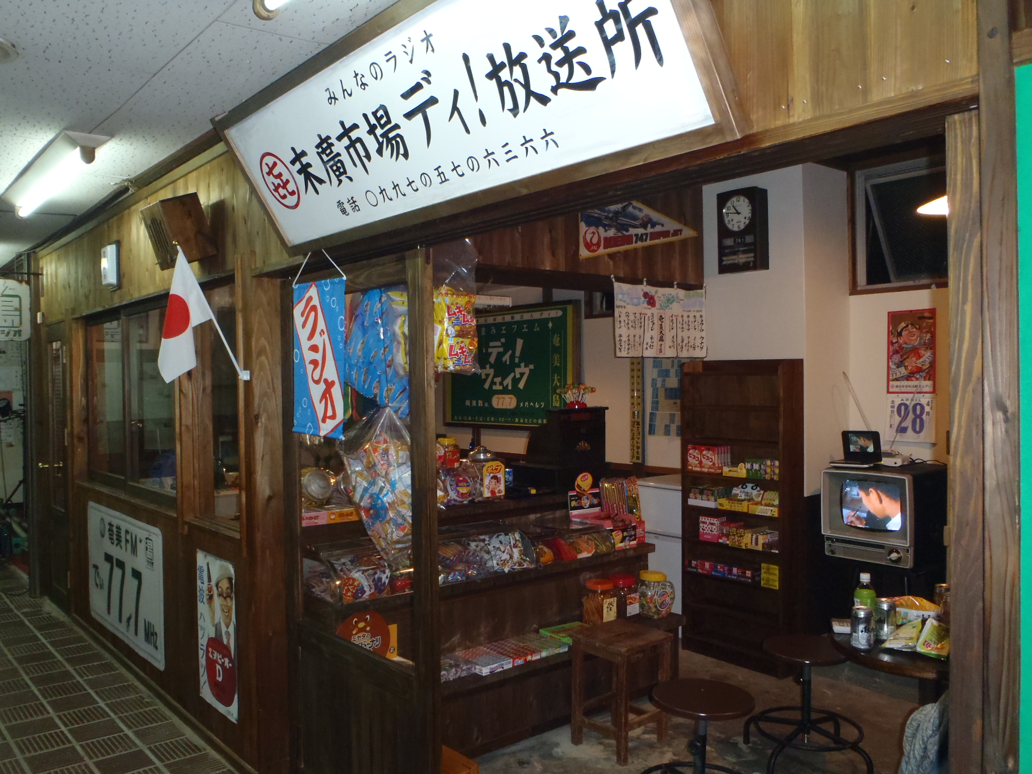 奄美市のコミュニティFMあまみエフエムのサテライトスタジオ